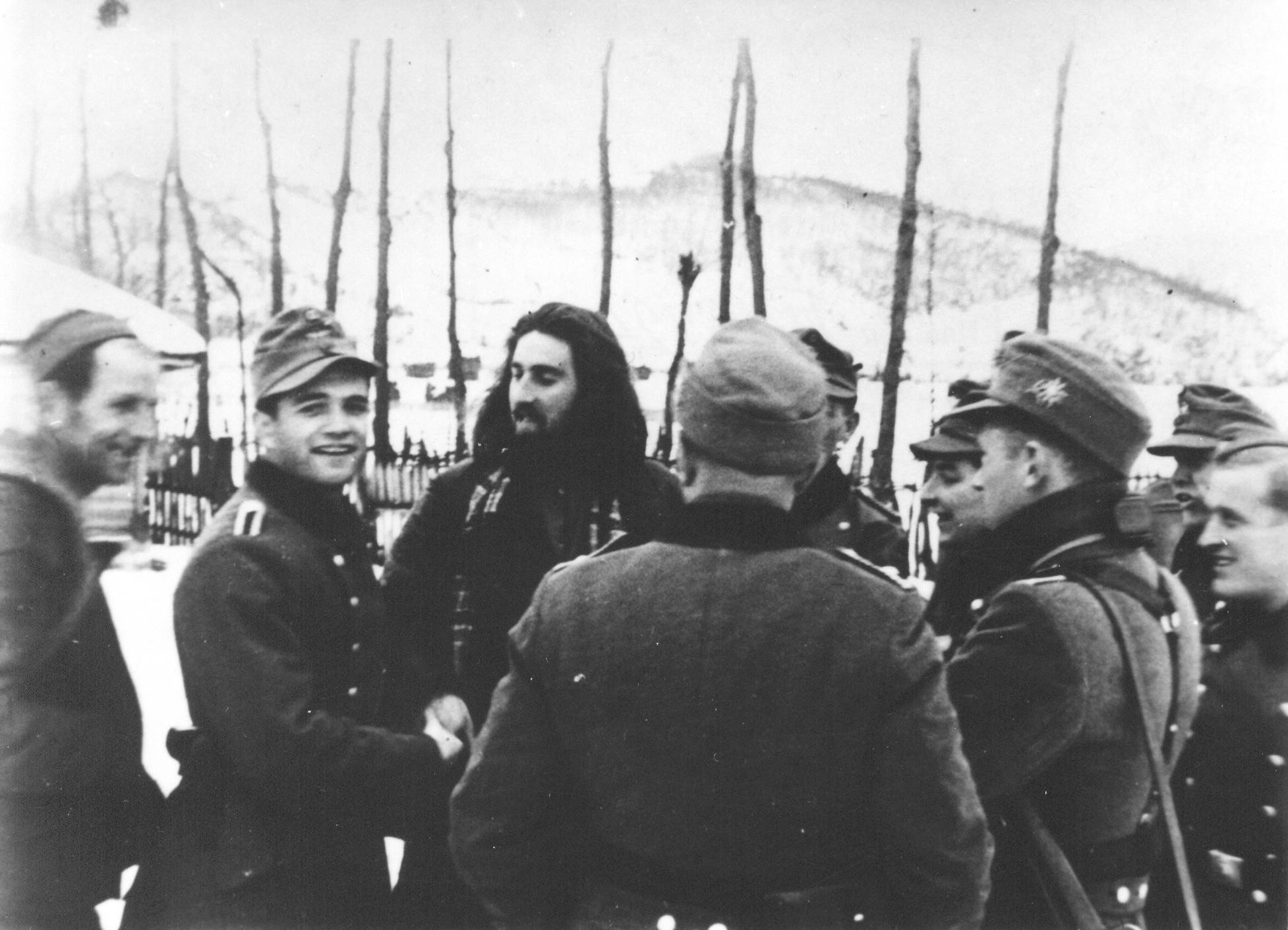 Srpskohrvatski / српскохрватски: Četnički komandant Stevan Leko Damjanović sa pripadnicima SS divizije u istočnoj Bosni, u dogovoru pred početak akcije protiv partizana.